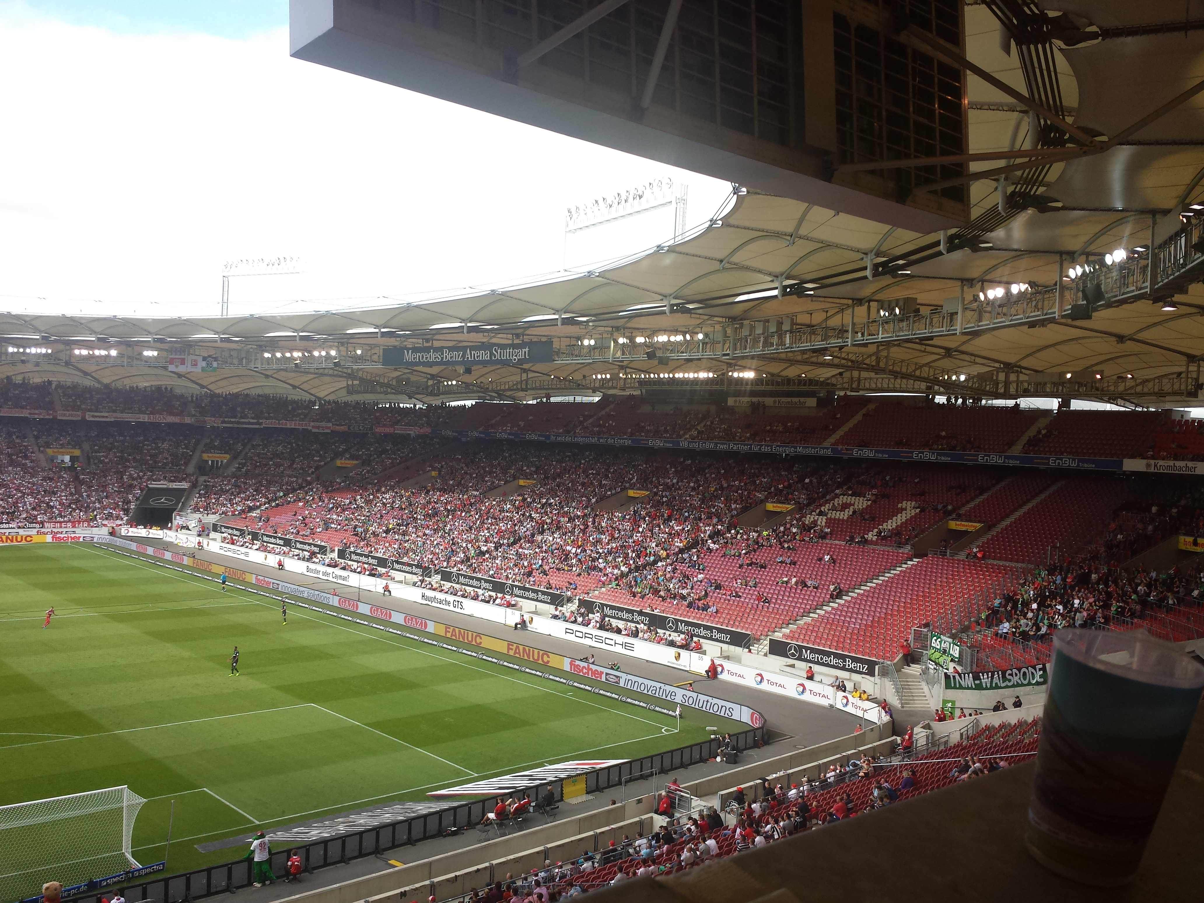 VfB Stuttgart - Hannover 96